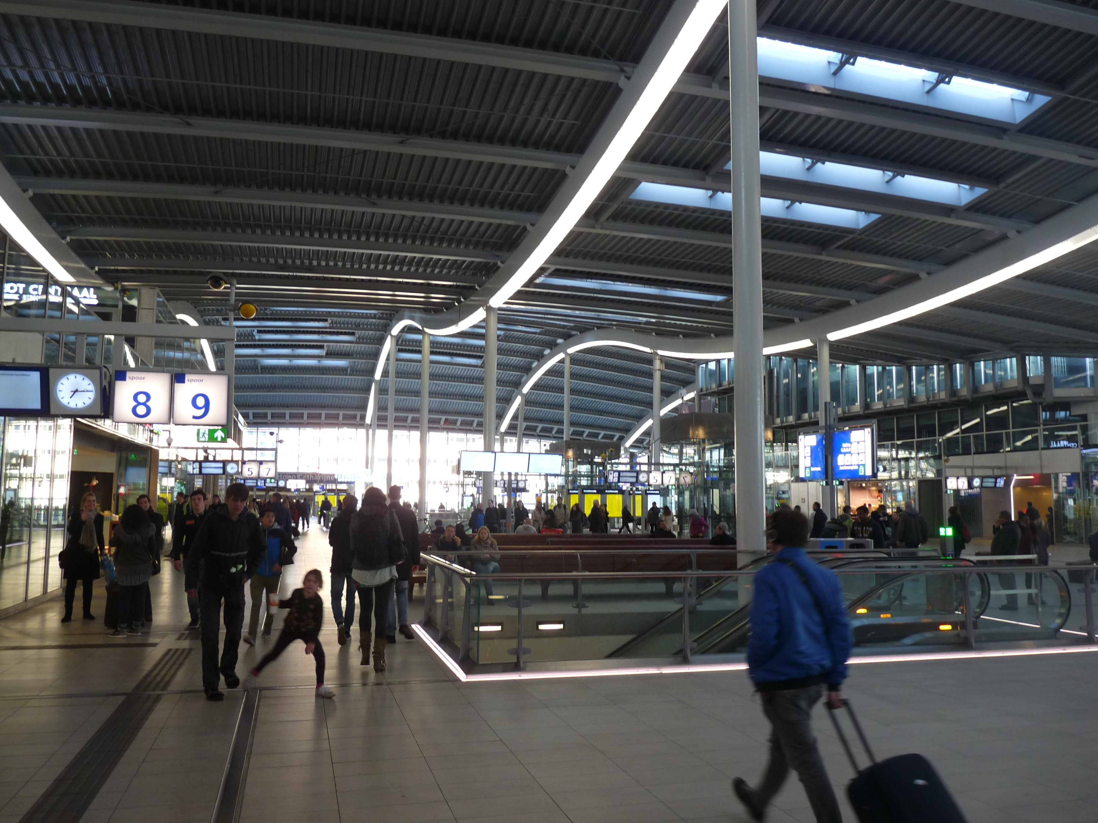 Utrecht Centraal met golvend dak